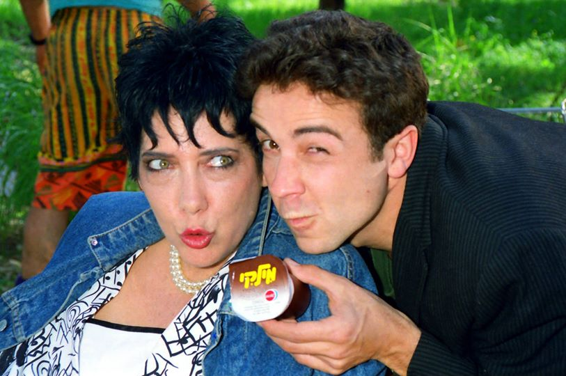 הפקת פרסומת הקרב על המילקי